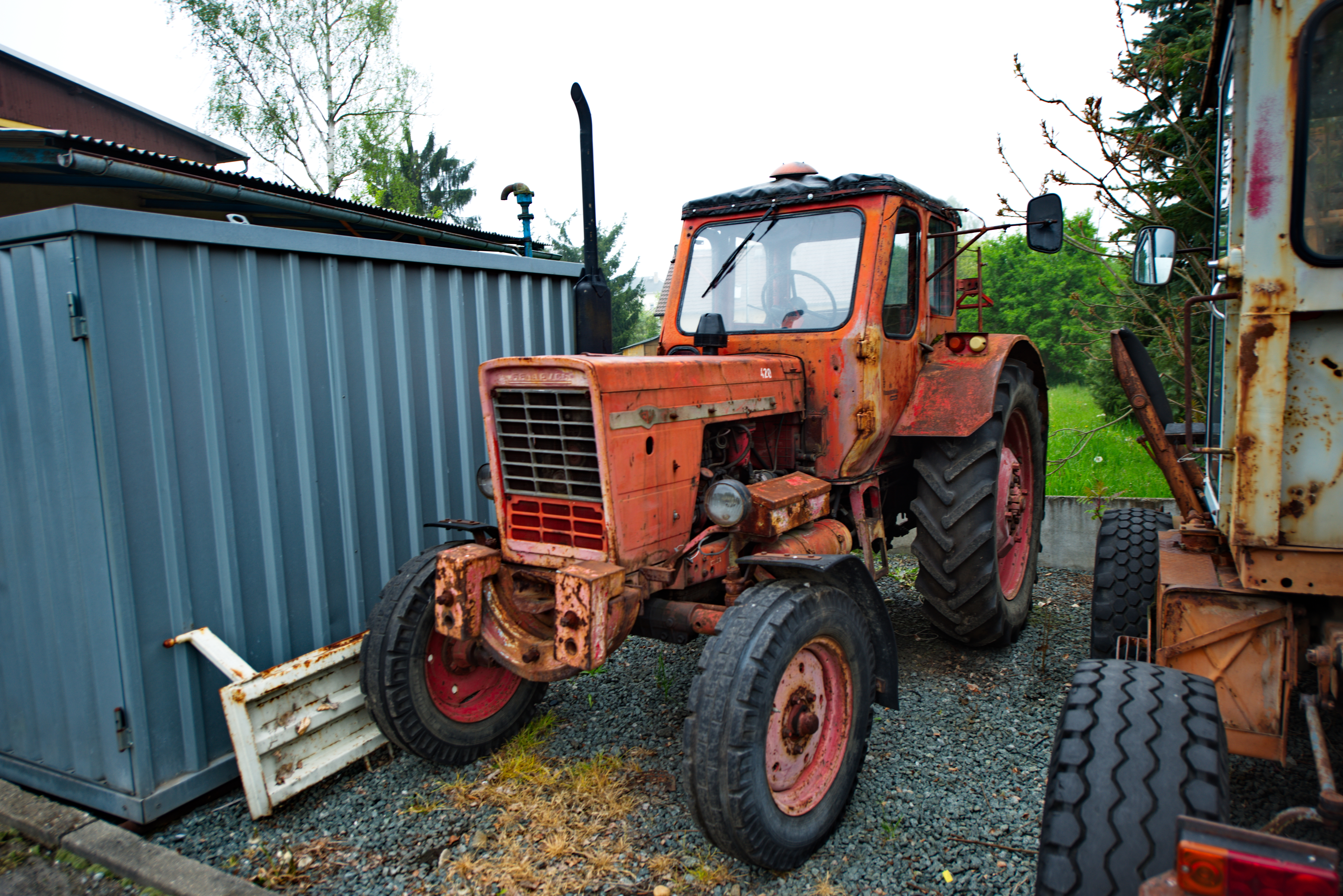 Traktor in Oderwitz, Sachsen